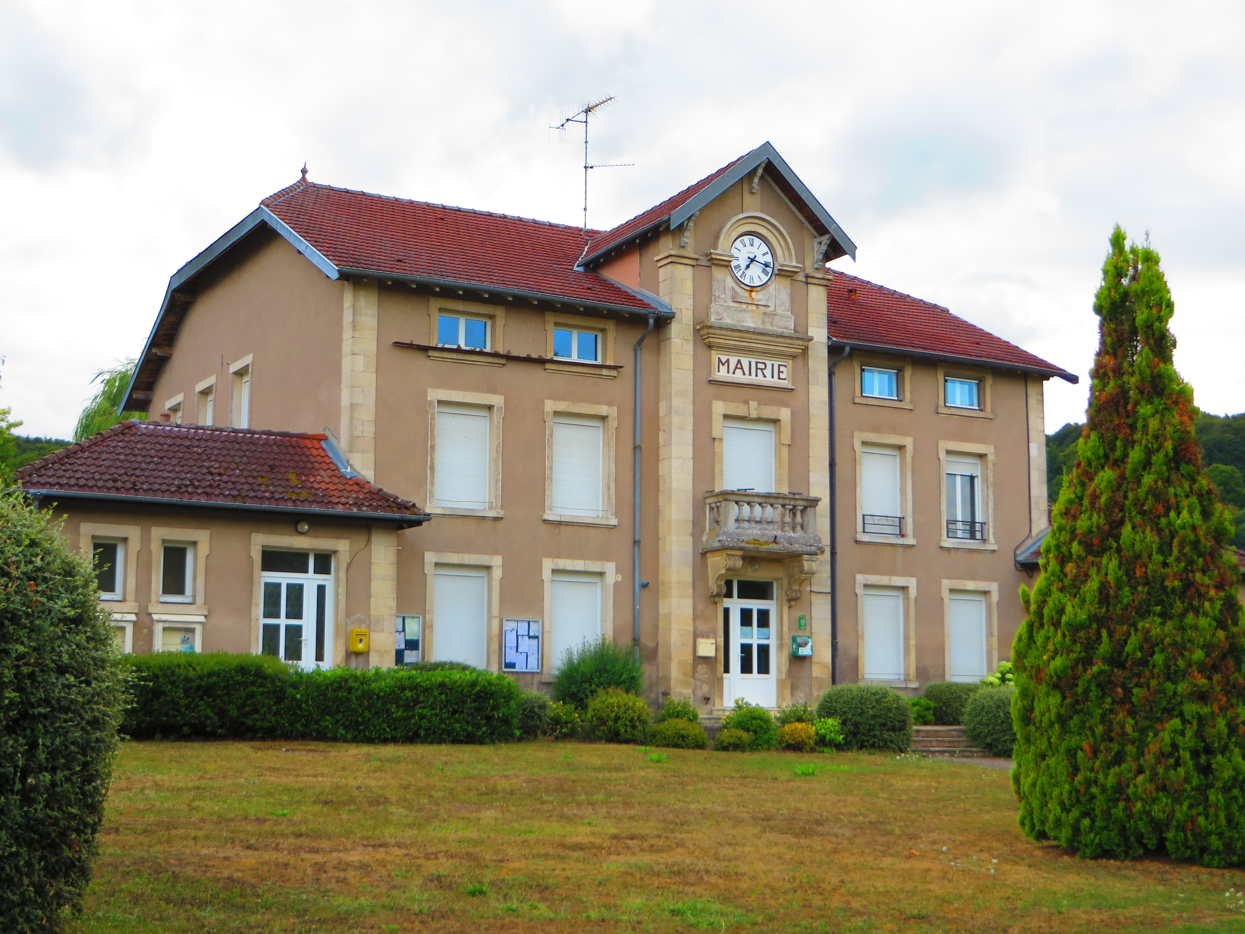 Herbeuville La mairie